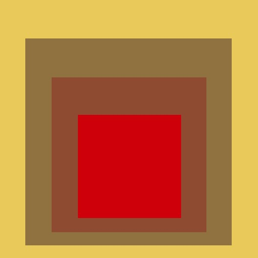 Das Bild zeigt den scheinbar räumlichen Aufbau, die scheinbare Durchsichtigkeit der Farbflächen und den Simultankontrast.